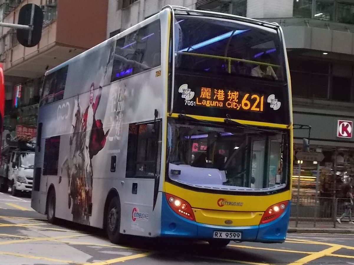 城巴621線，駛經軒尼詩道前往麗港城